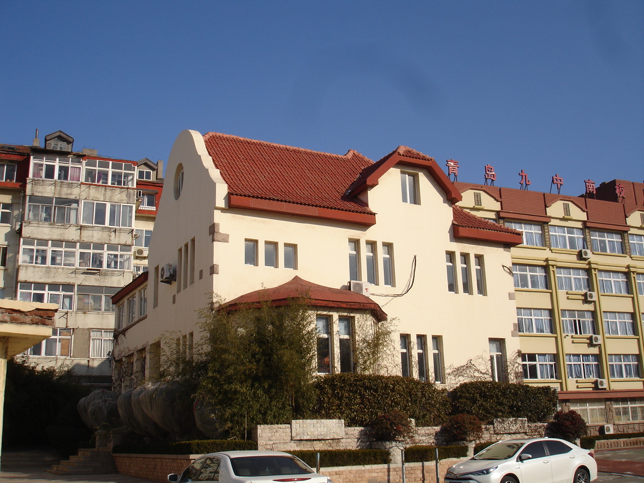 思聂楼旧址